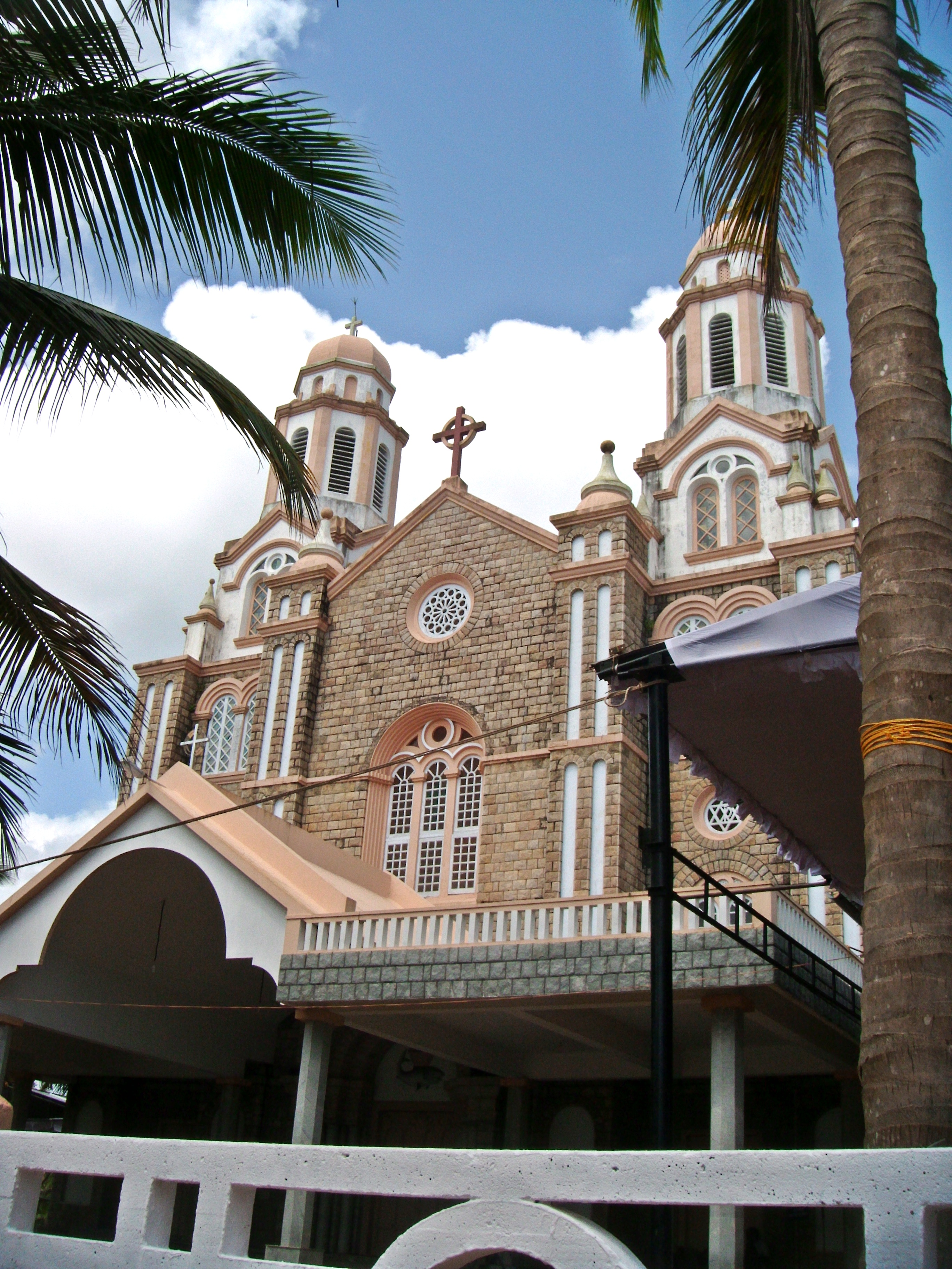 Trivandrum, Kerala, Indien, St. Mary`s Cathedral